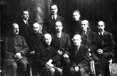 Група беларускіх пісьменнікаў і літаратуразнаўцаў - чальцоў Інстытута беларускай культуры ў Доме культуры на Фантанцы: у 1-ым радзе - М. Азбукін, У. Чаржынскі; у 2-ім радзе - Ч. Родзевіч, В. Міхальскі, С. Некрашэвіч, Я. Купала, Я. Колас; у 3-ім радзе - А. Круталевіч, М. Гуткоўскі, М. Грамыка. Ленінград (Горад Санкт-Пецярбург), Расія. 1926 г.(БДАКФФД, 1-4912.)